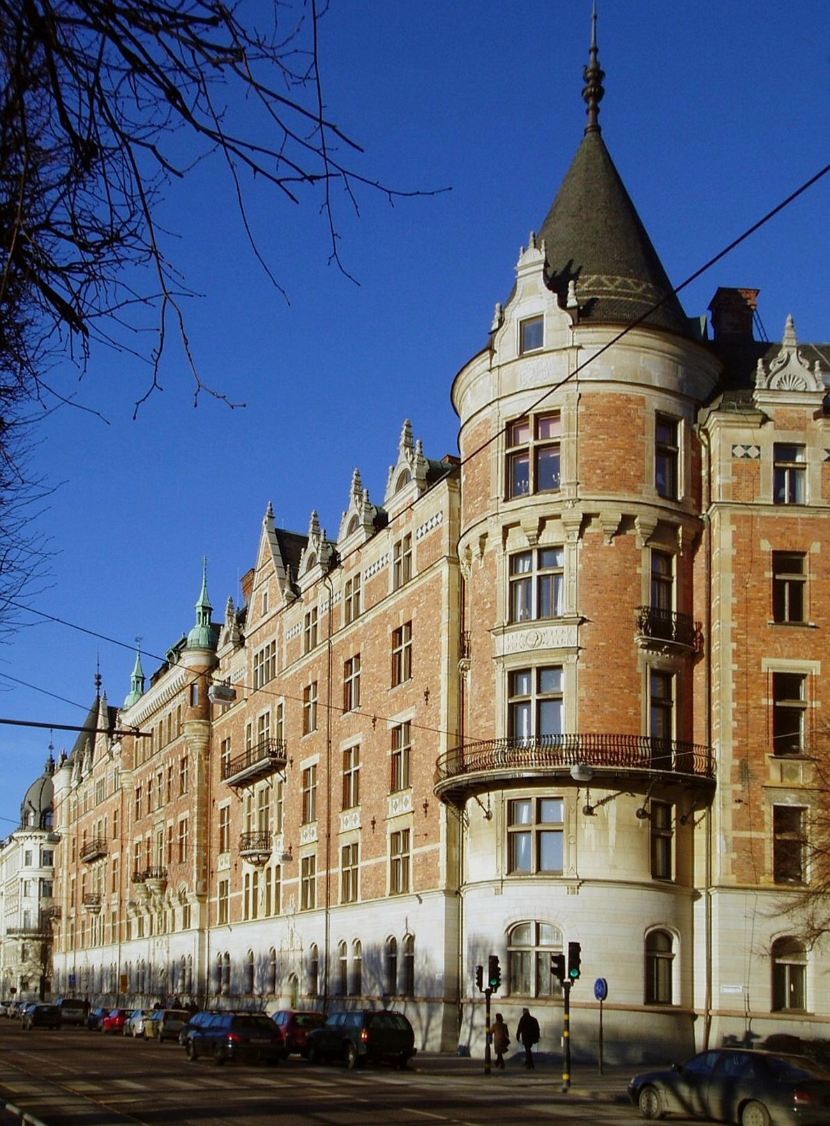 Bünsowska huset, Strandvägen, Östermalm, Stockholm